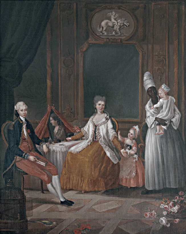 Portrait de la famille Maximilien Claude Joseph de Choiseul Meuse (1736-1816), à la Martinique, accompagné d’une nourrice tenant un enfant dans ses bras.